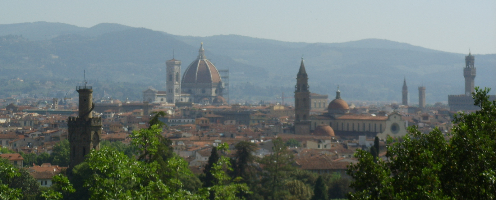 Palazzo di San Francesco di Paola, vista